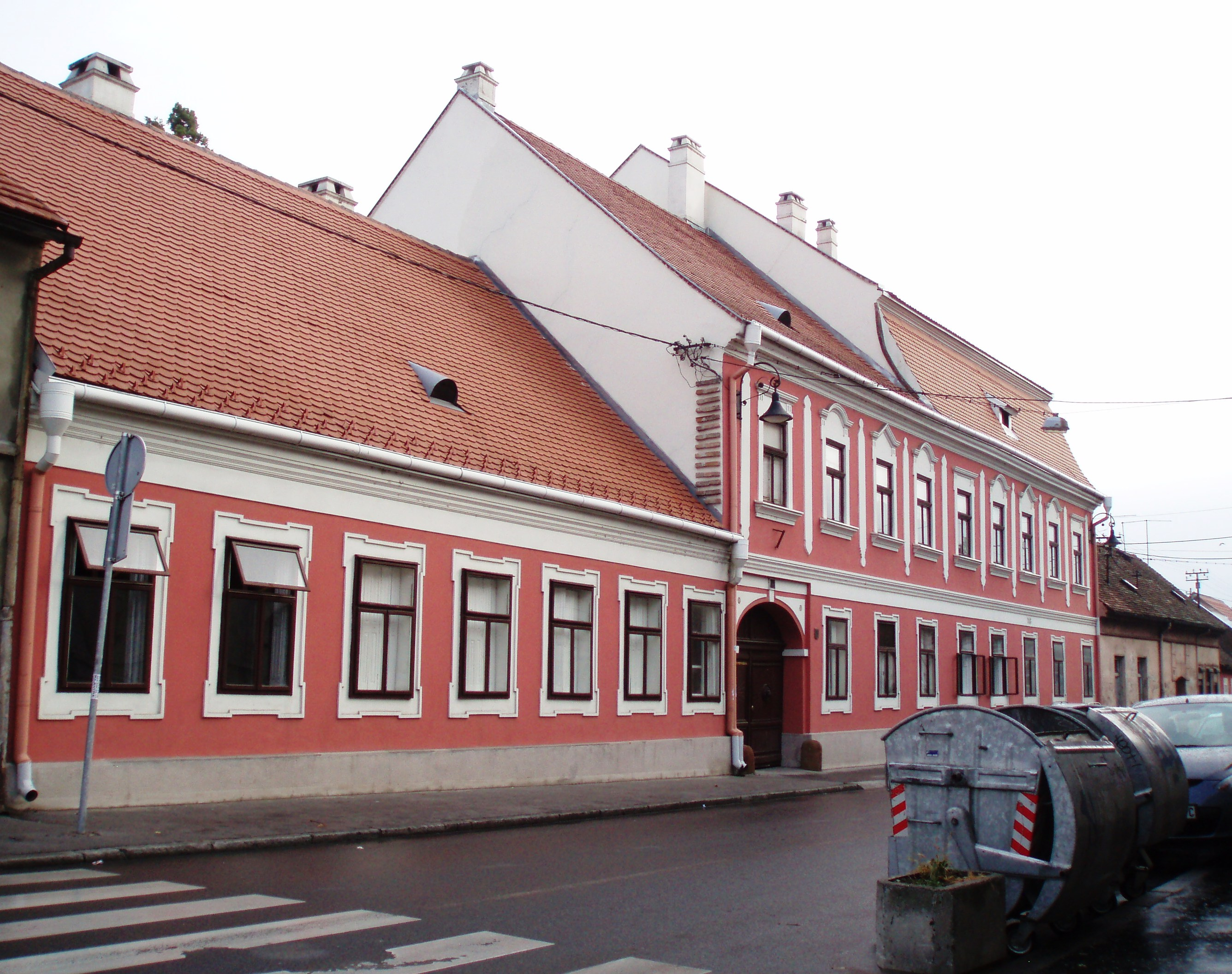 Kuća porodice Karamata, Zemun, Karamatina 17, sagrađene 1764, Autor:Nicolo